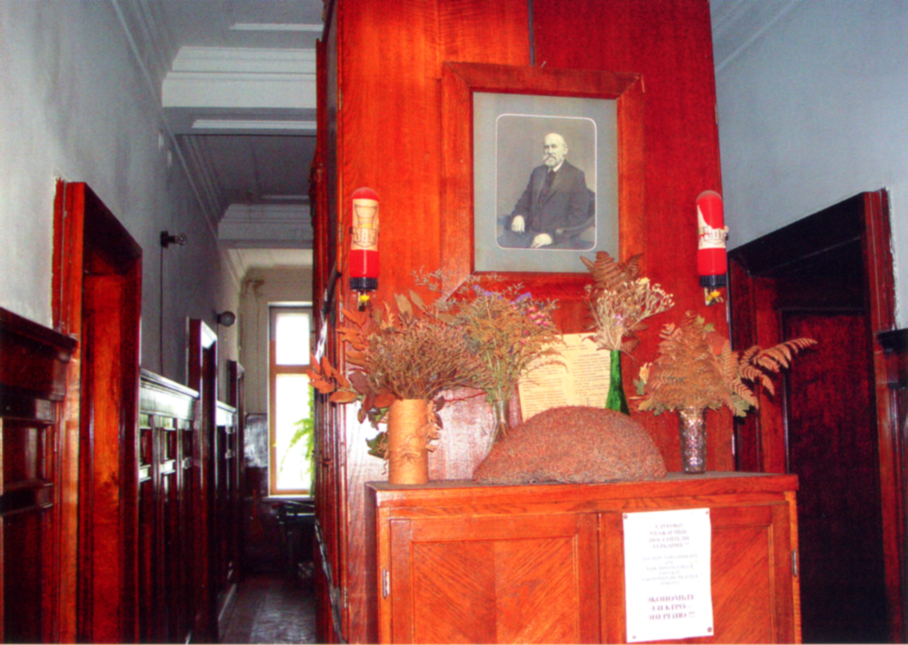 Гербарий Московского университета